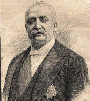 President Félix Faure (1841 - 1899)